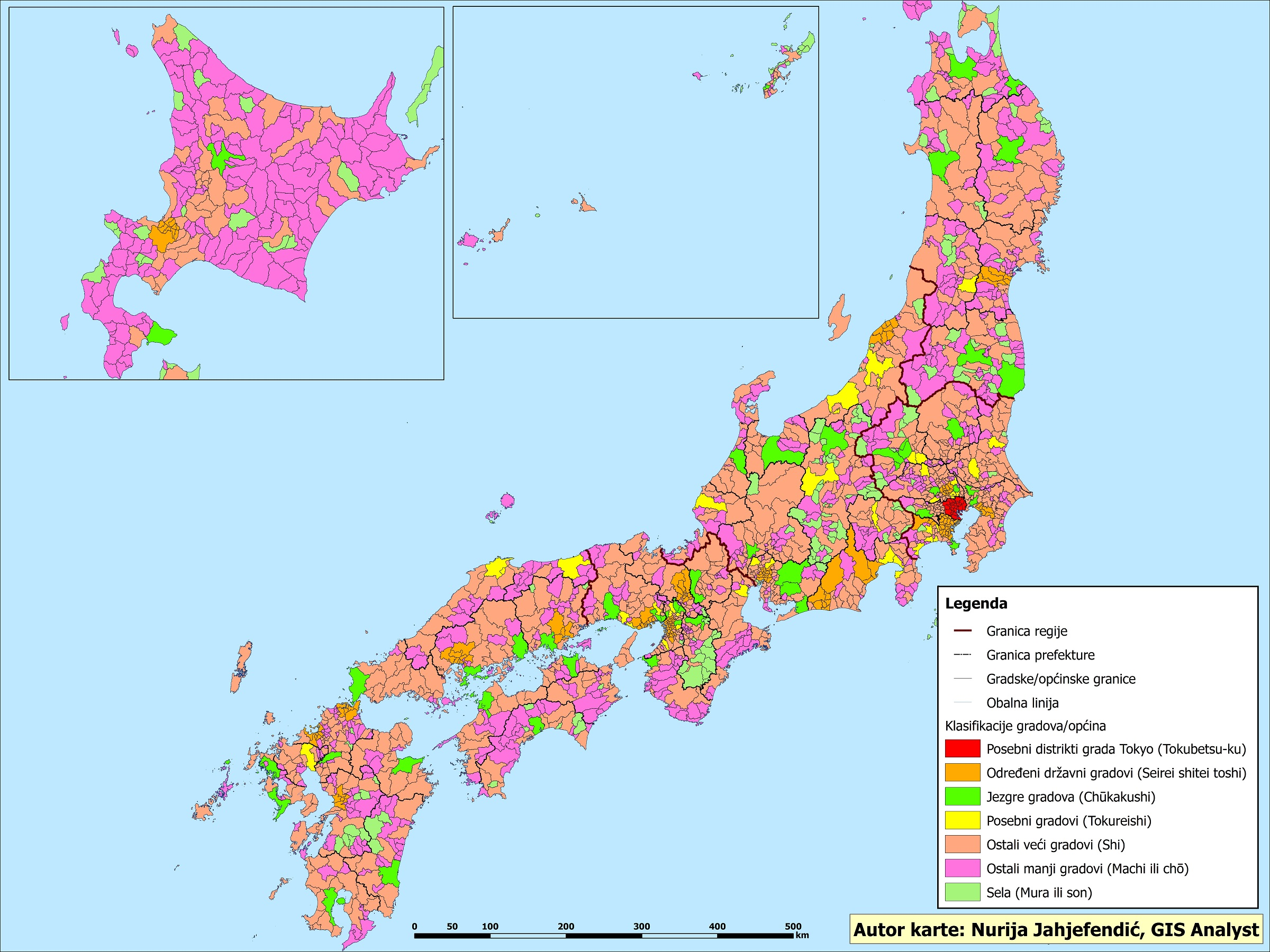 Detaljna klasifikacija naselja/općina u Japanu